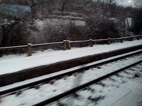 Szár vasúti megállóhely